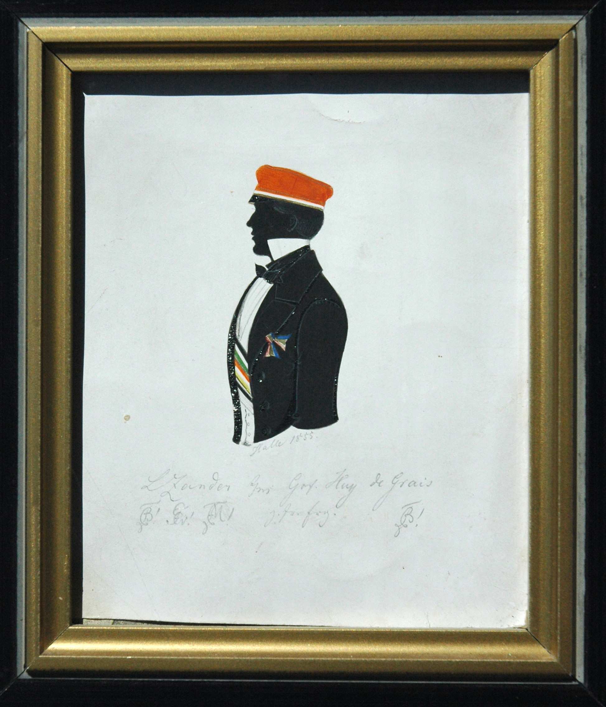 Widmungssilhouette des Corpsstudenten Leonhard Zander (1833-1890), Halle (Saale), 1855